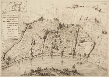 Bordeaux vers 1470 (Léo Drouyn, encre sur papier, 1893)